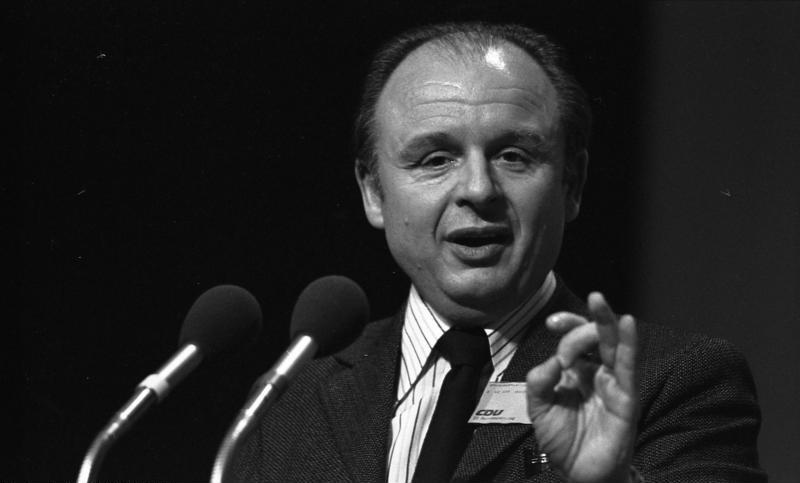 22. Bundesparteitag der CDU in Hamburg (Konrad Grundmann) 18.-20.11.1973